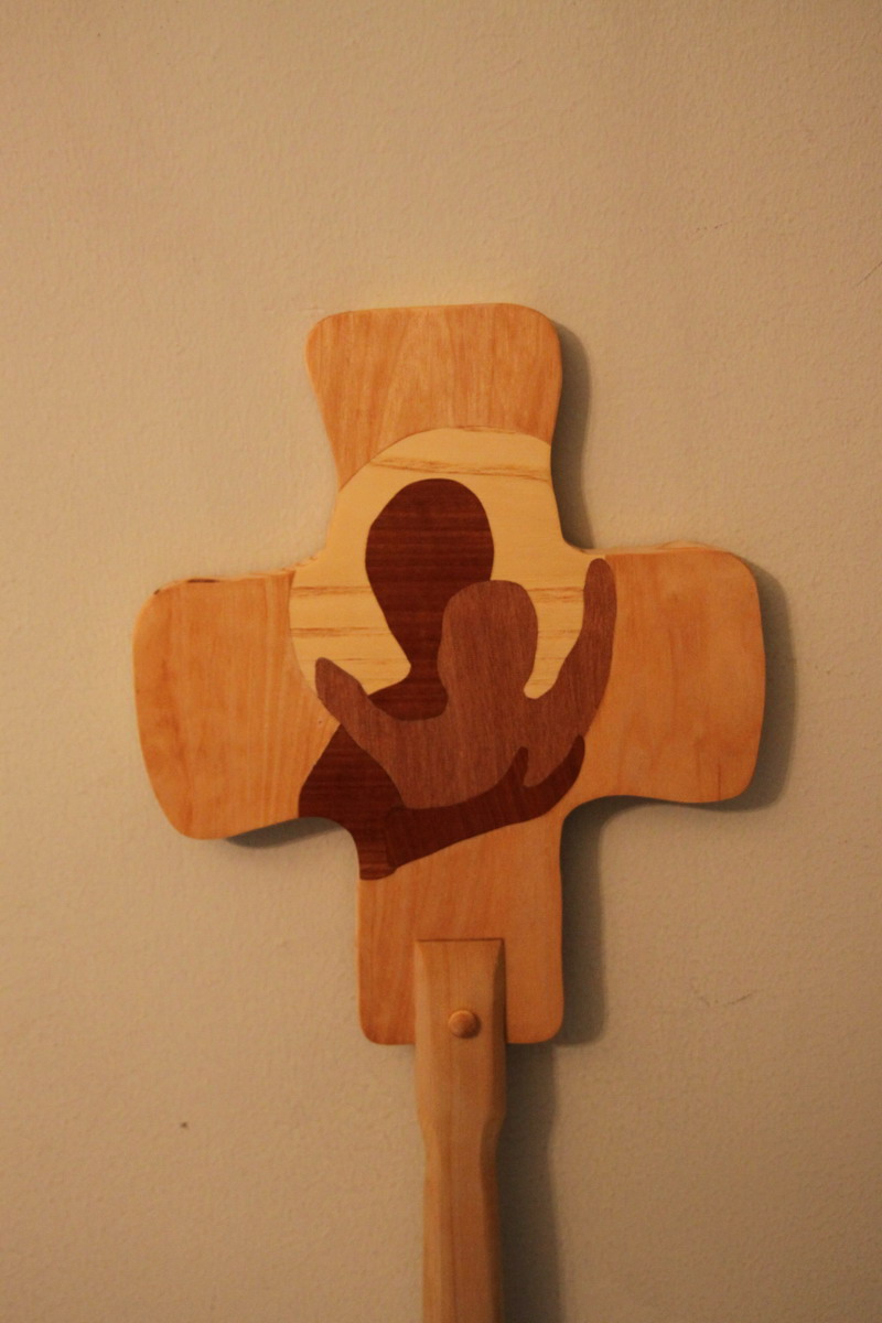 Processionskors i Krokeks kyrka speciellt för barn, utfört av Ingårdas Åsa i intarsia